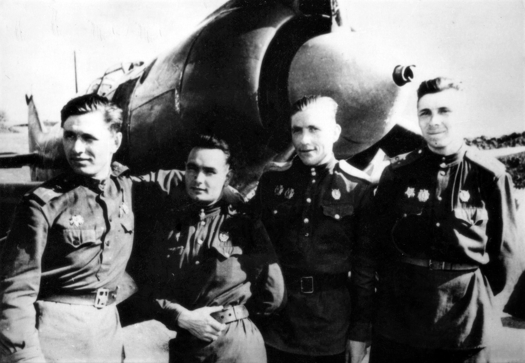 Лётчики 31-го истребительного авиационного полка на фоне истребителя Ла-5ФН. Слева направо: заместитель командира эскадрильи старший лейтенант Н.М. Скоморохов, командир эскадрильи капитан Д.С. Кравцов, командир эскадрильи капитан Н.И. Горбунов и заместитель командира эскадрильи старший лейтенант И.И. Быстров (Иван Исакович Быстров, 1918 г.р., уроженец города Великие Луки, за годы войны совершил свыше 330 боевых вылетов, лично сбил 14 самолётов противника и 1 в составе группы)